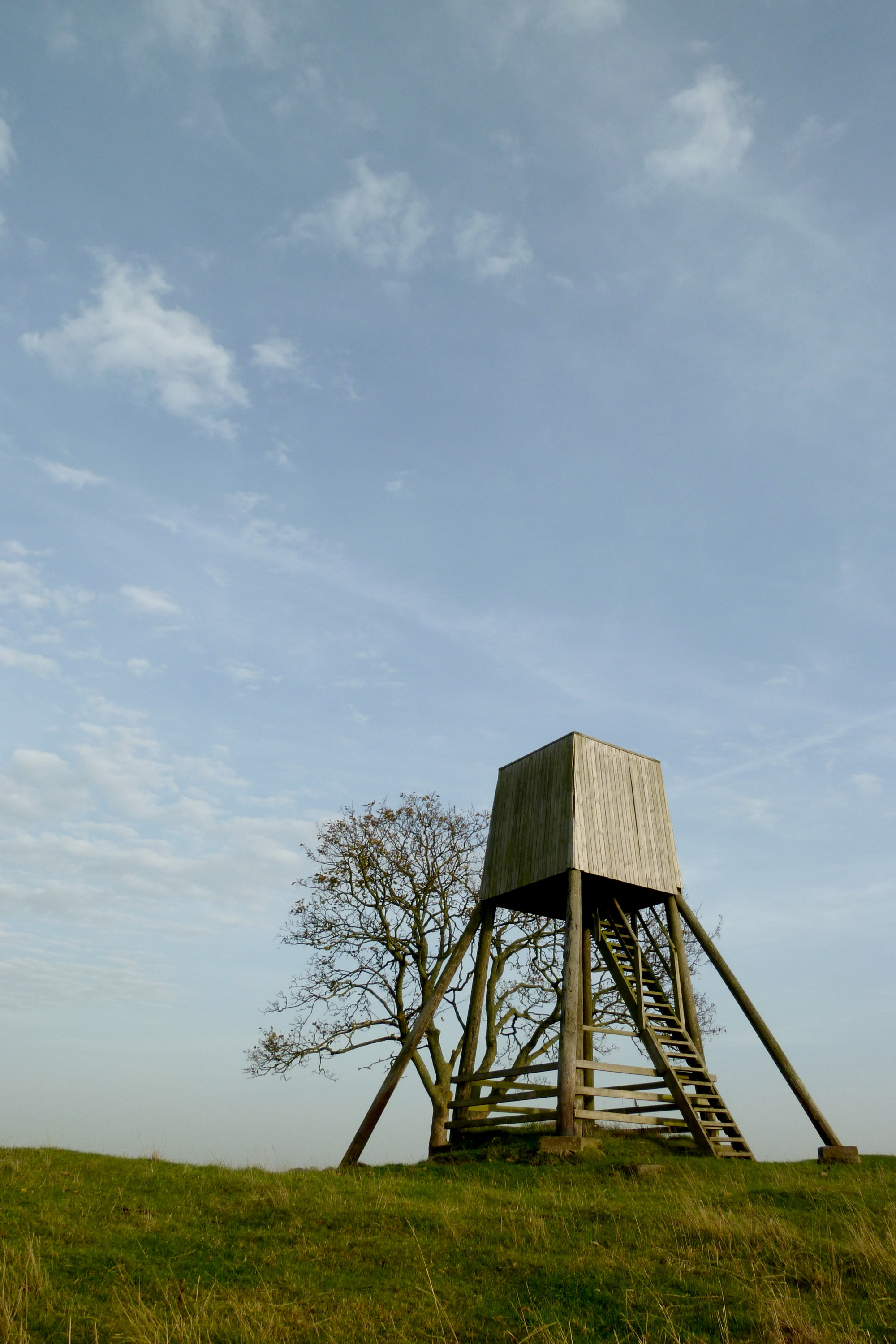 En bild på fågeltornet som står på naturreservatet Löddeåns Mynning.